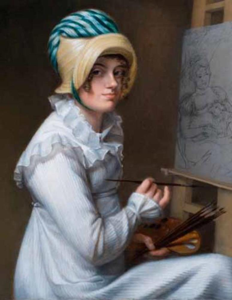 Selsportret fan Wilhelmina Geertruida van Idsinga